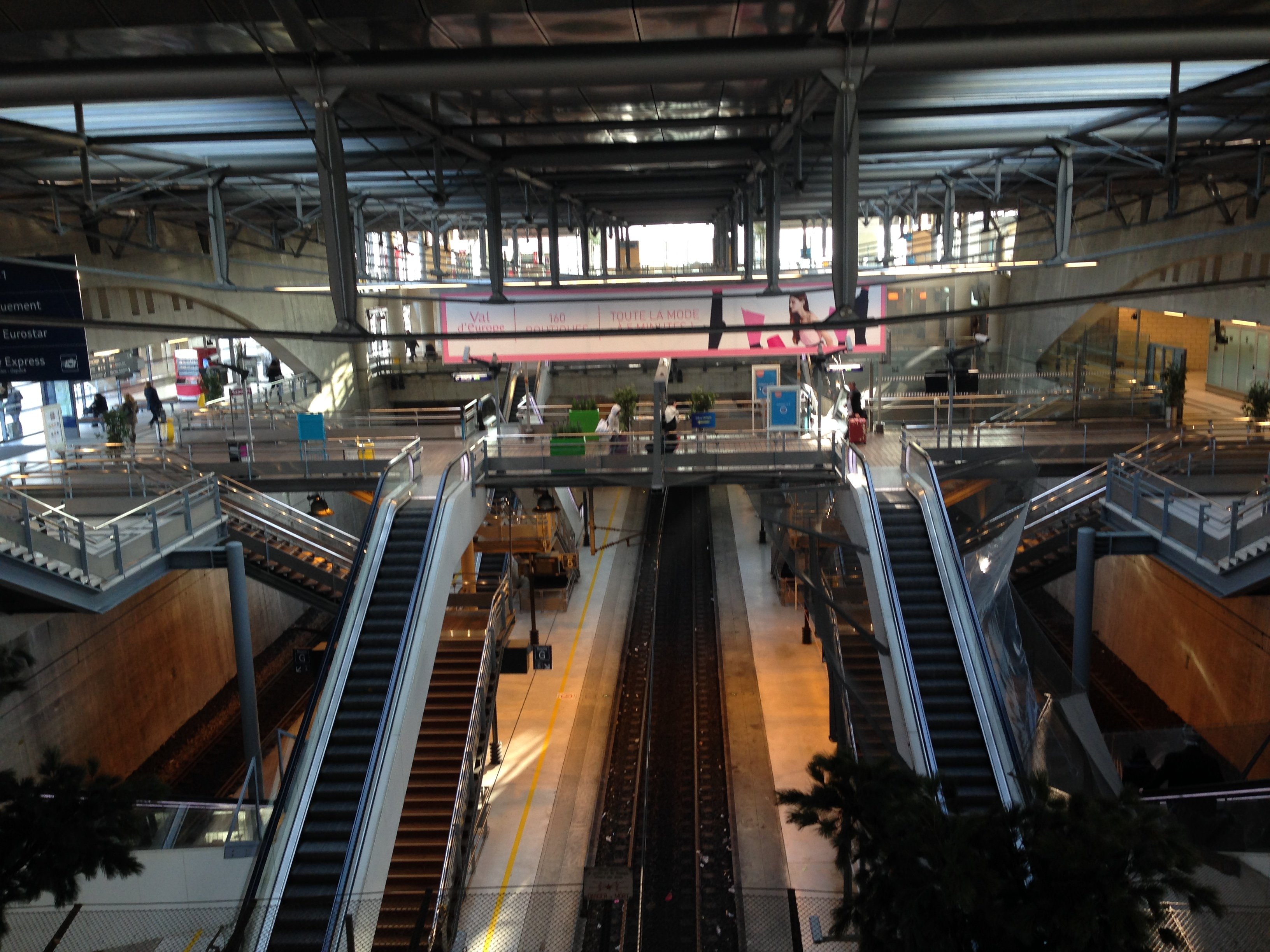 L'intérieur de la gare de Marne-la-Vallée - Chessy